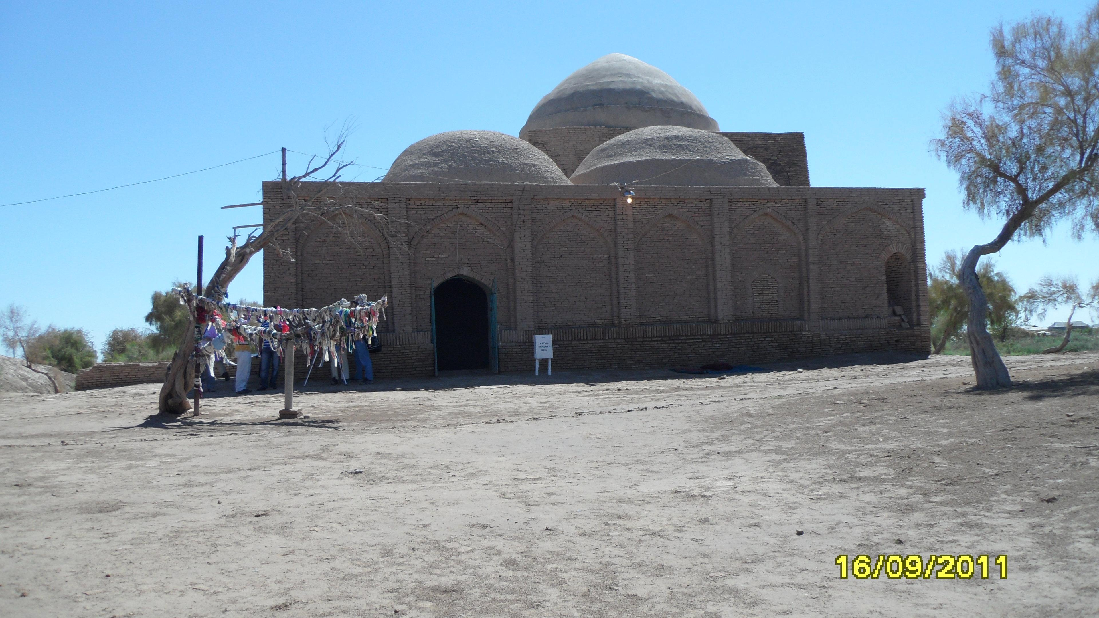 MervTurkmenistan Ibn Zeid Mausoleum